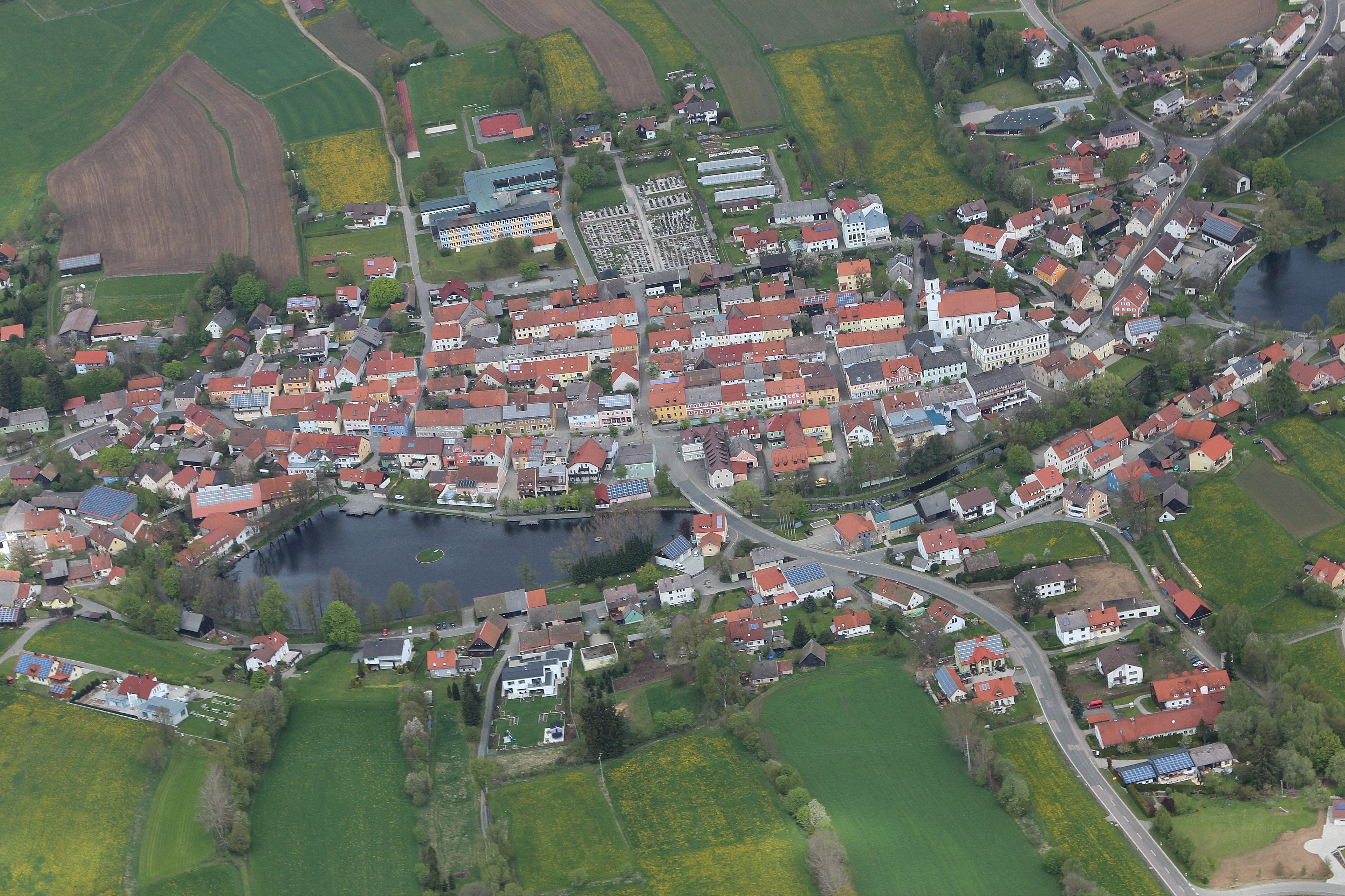 Stadtkern von Schönsee, Landkreis Schwandorf, Oberpfalz, Bayern (2015)